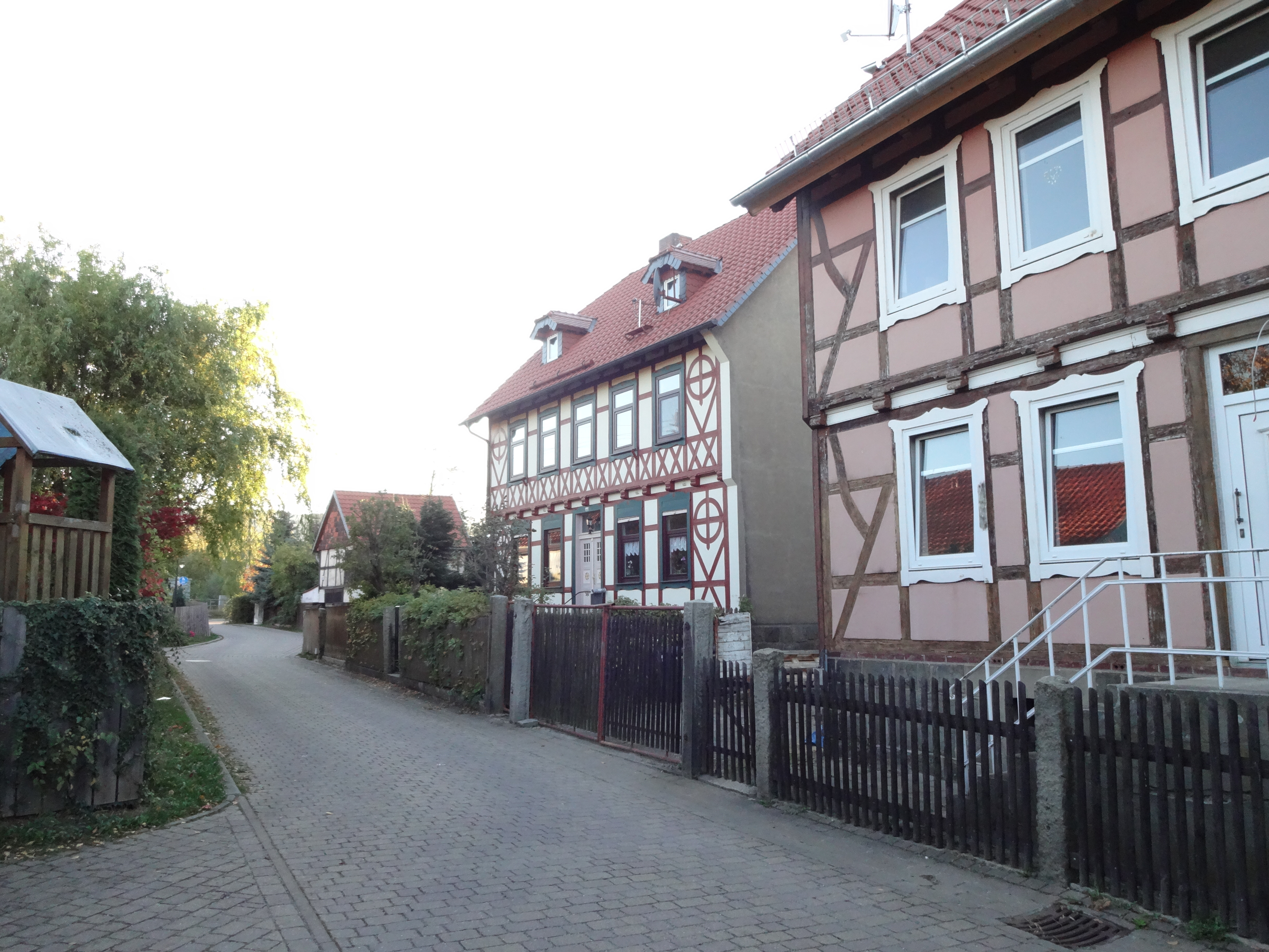 Denkmalgeschützte Häuser in Darlingerode, Teil der geschützten Straßenzugs Auf der Heide 2, 4, 6, 8, 10, 12, 14